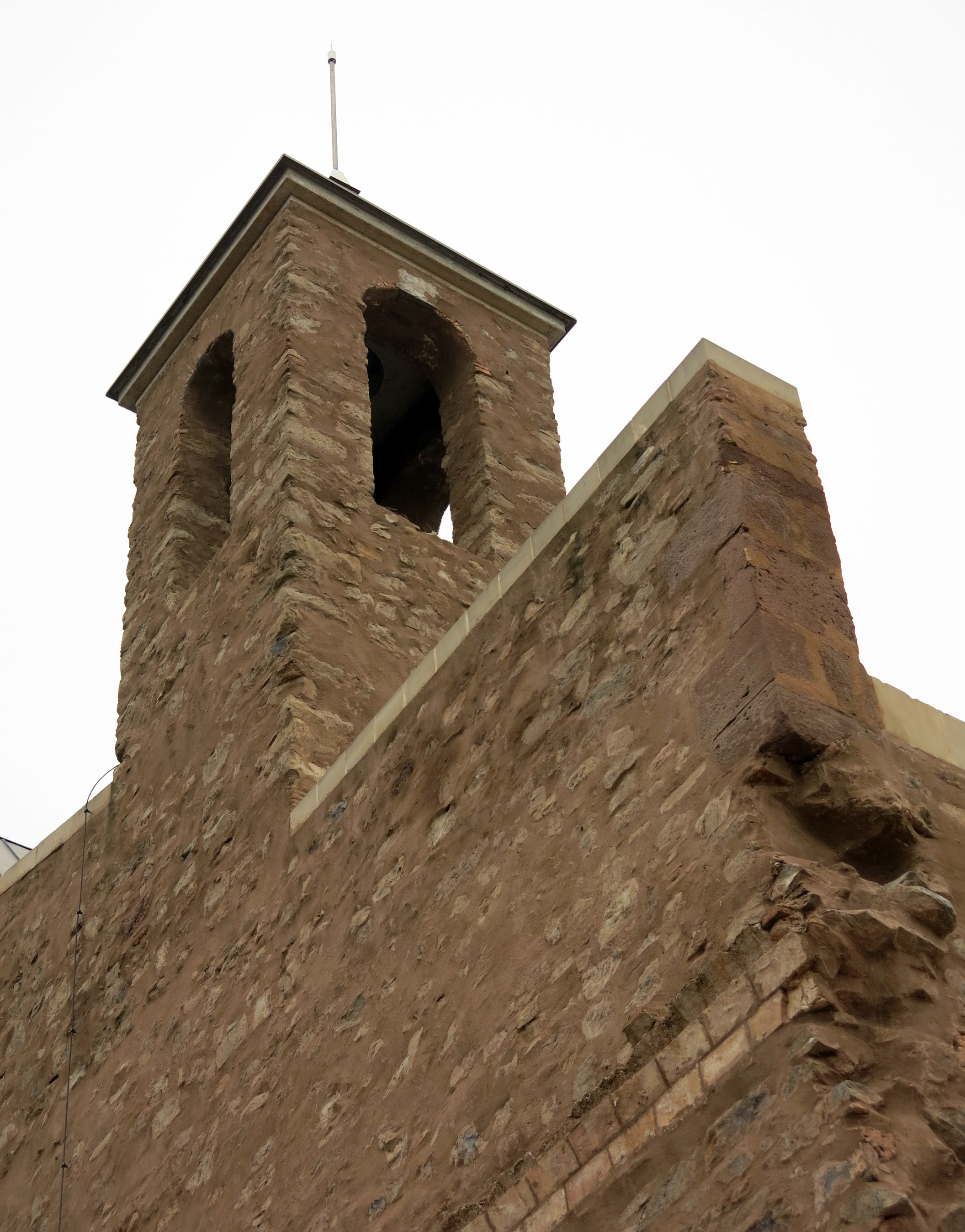 Convent de Sant Francesc (Santpedor)